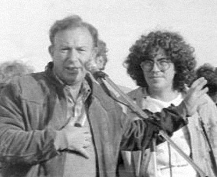 Foto de Alejandro Mayol y Piero